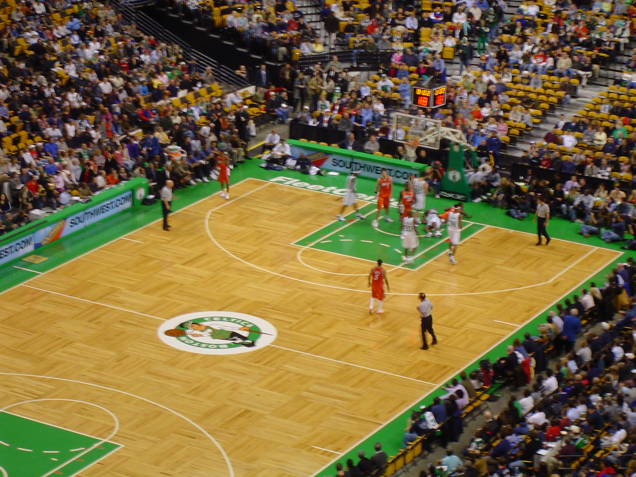 Celtics Game